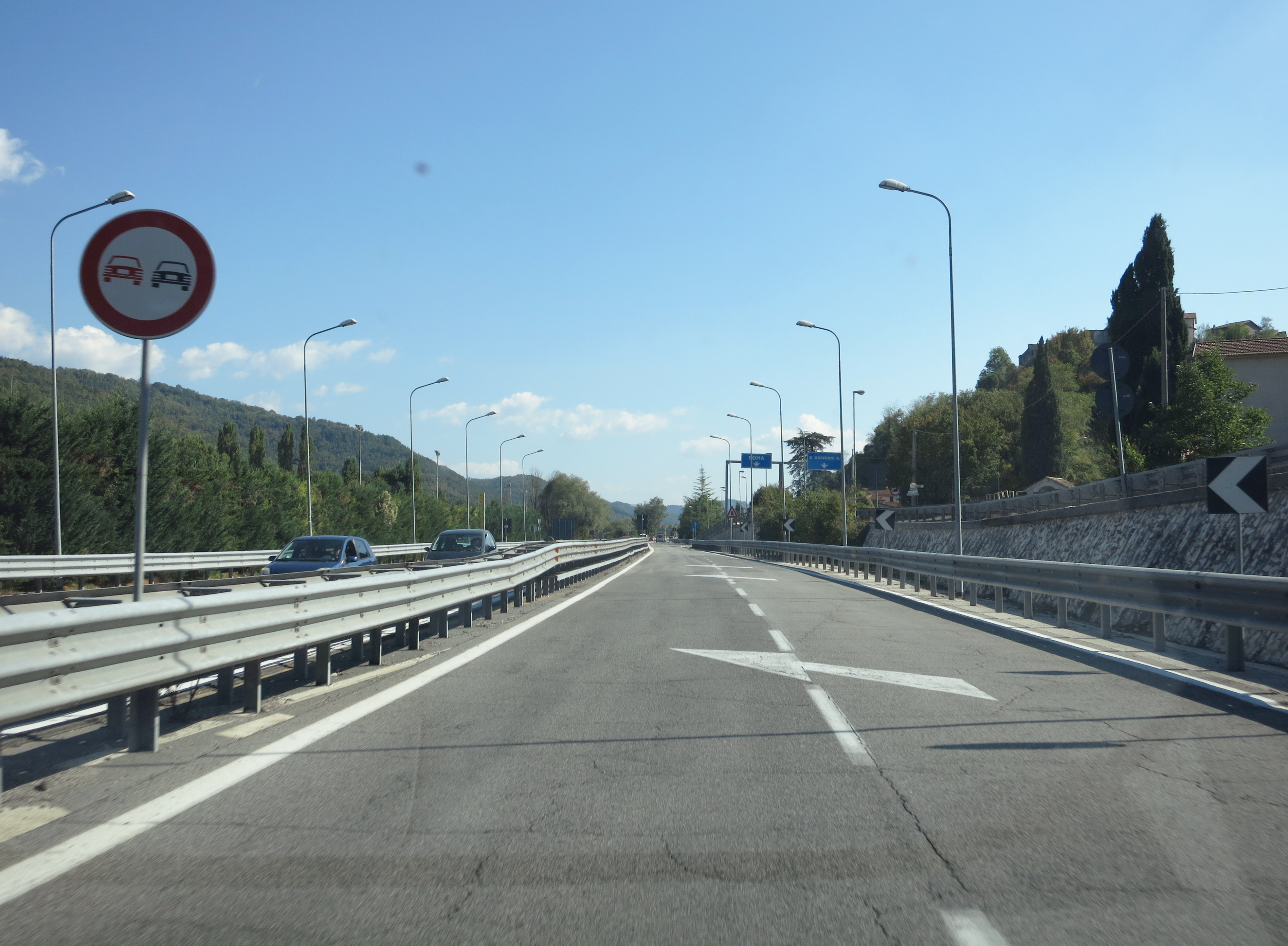 Km 71 della Strada Statale 4 Via Salaria, nei pressi di San Giovanni Reatino (frazione di Rieti) - sbocco sud della galleria Colle Giardino in direzione sud (Roma), dove finisce il tratto a due corsie per senso di marcia